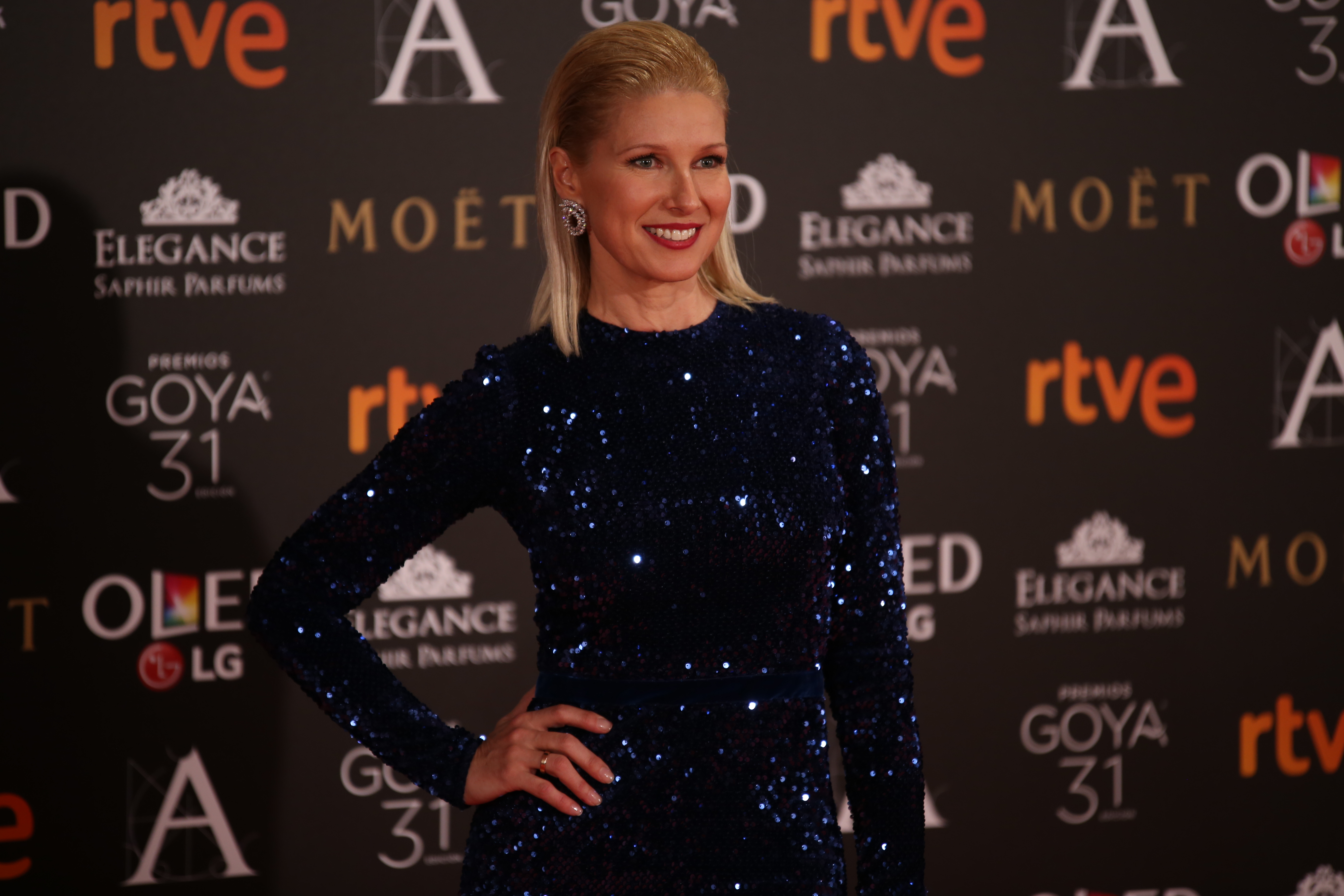 Premios Goya 2017